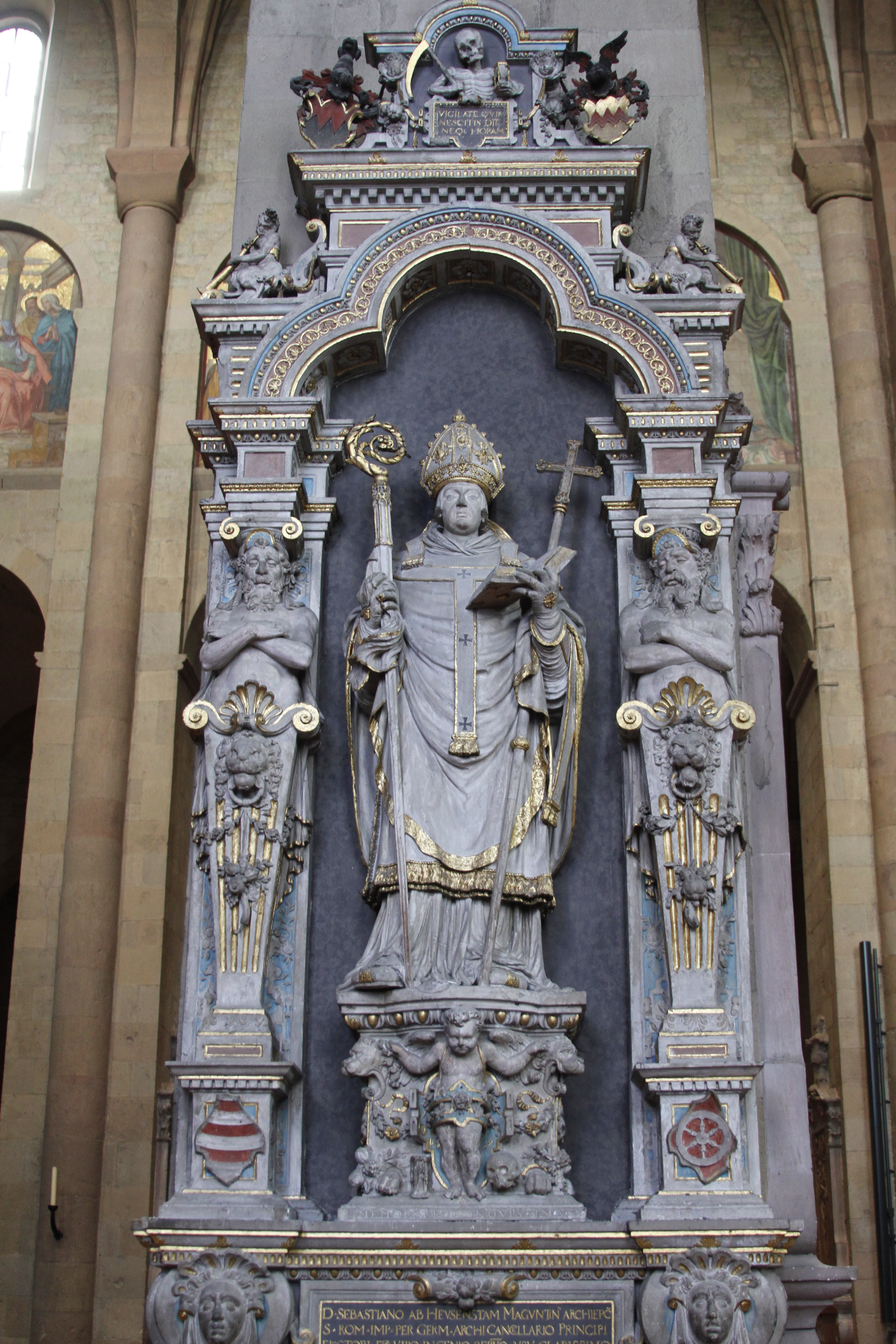 Mainz Cathedral - Mainz - Germany